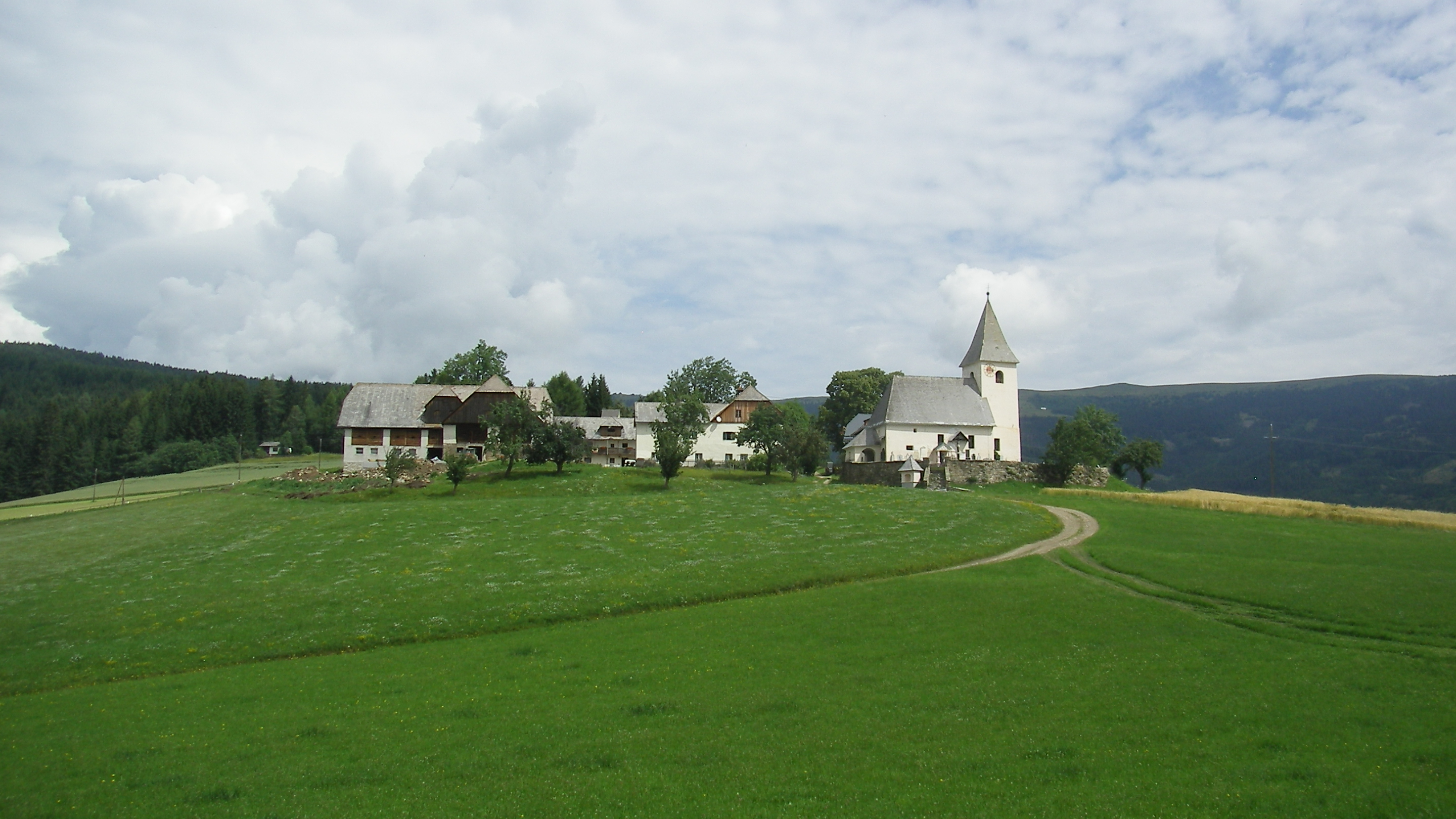 Ortskern von Sankt Johann am Pressen